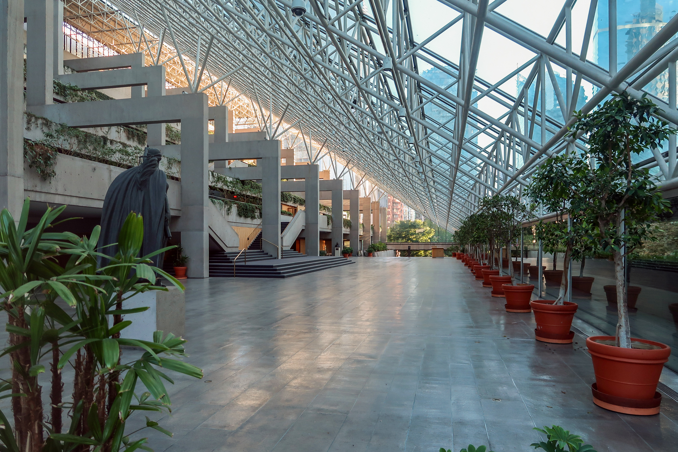 Law Courts (Vancouver)